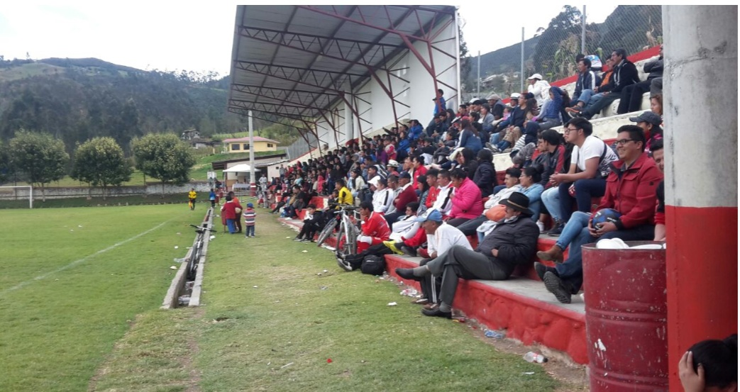 Estadio Ruben Velez Nunez